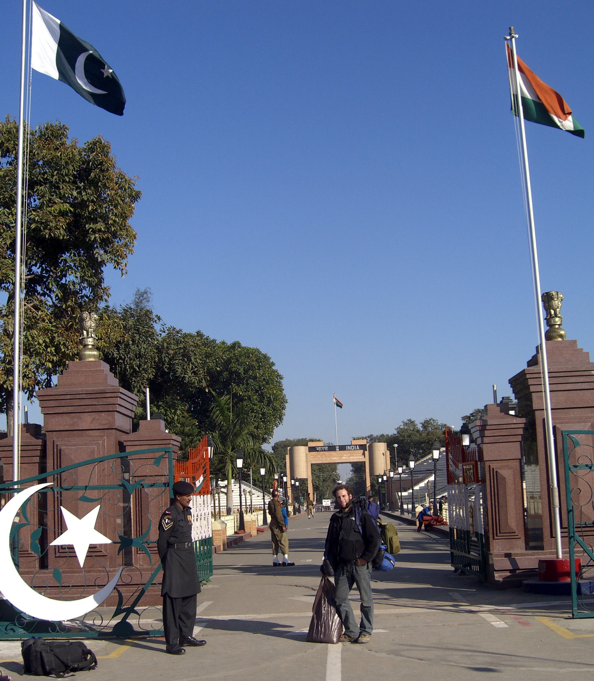 Indo-Pak Border